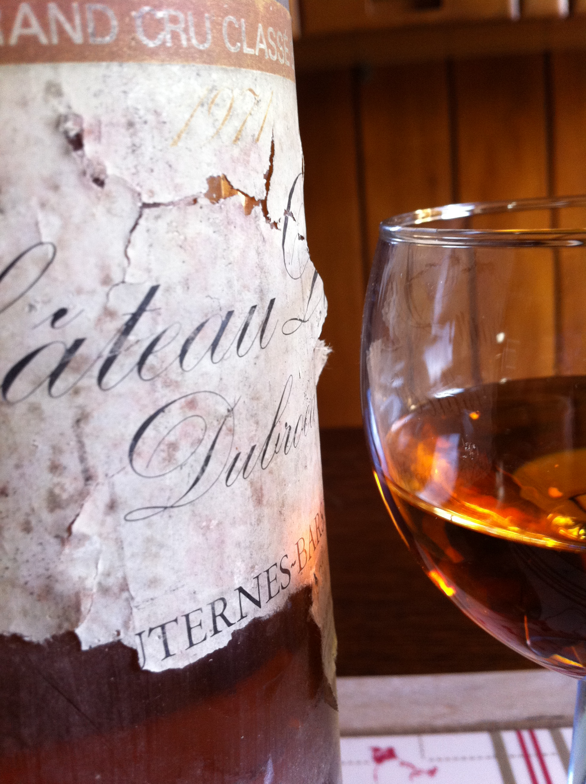 Château Doisy-Dubroca (Sauternes-Barsac 2e grand cru classé) 1971.